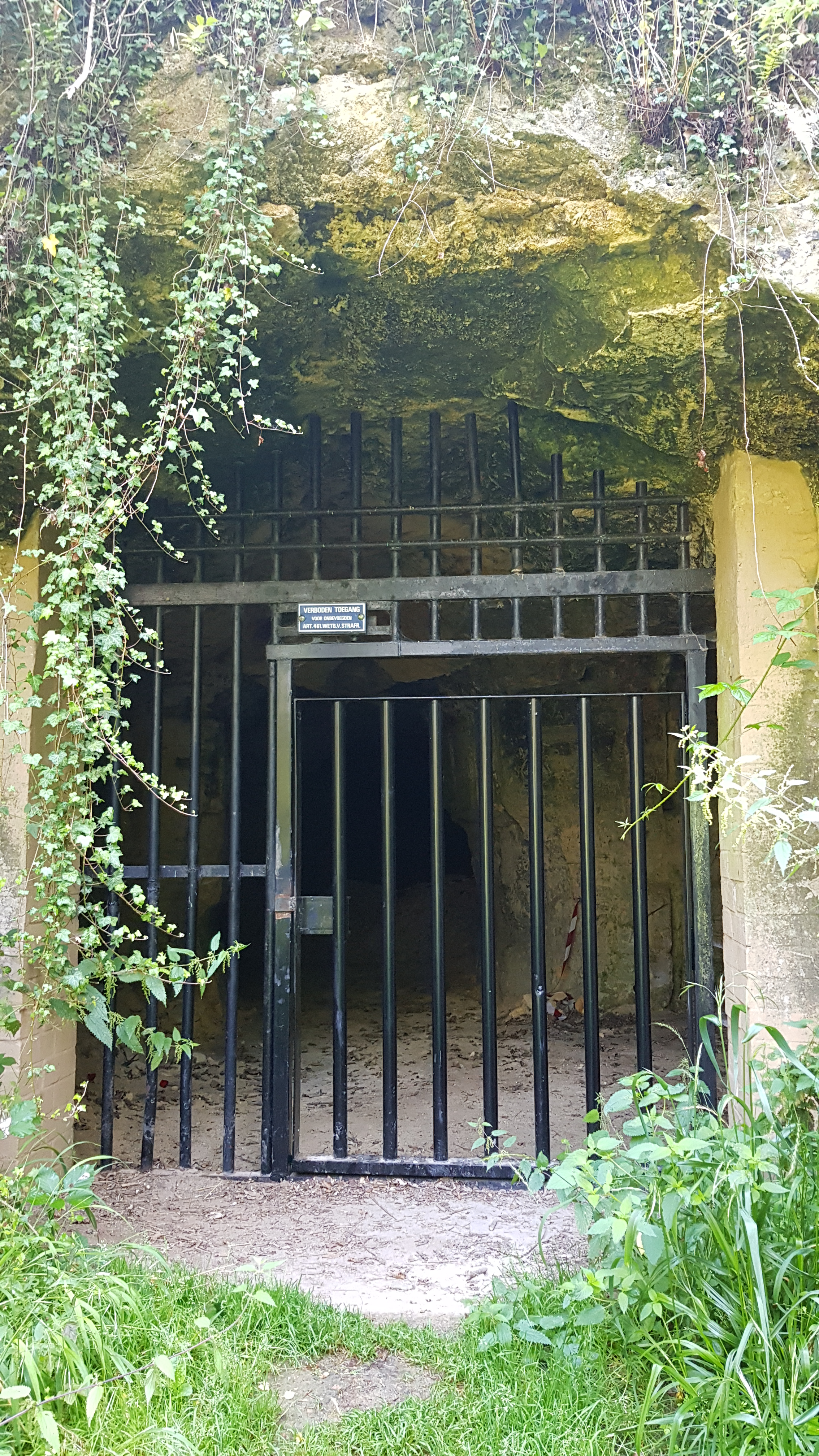 Koelebosgroeve, Bemelen, Nederland